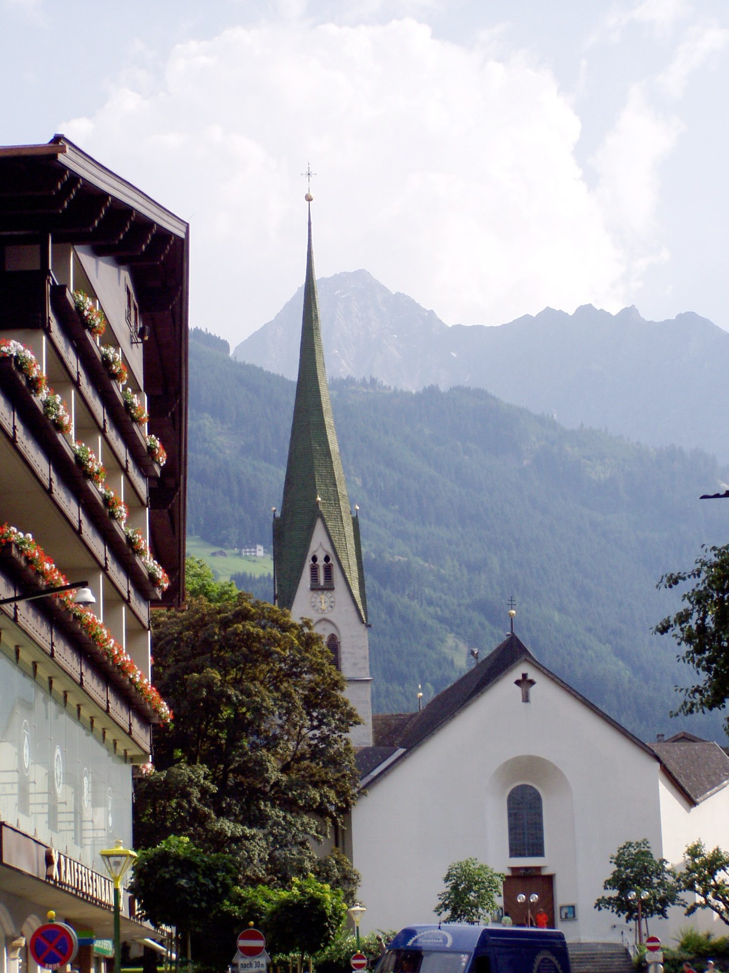 Photographie personnelle du clocher tors de l'église paroisiale de Mayrofen prise le 06 juillet 2006 par Accrochoc, lors d'un voyage en Autriche